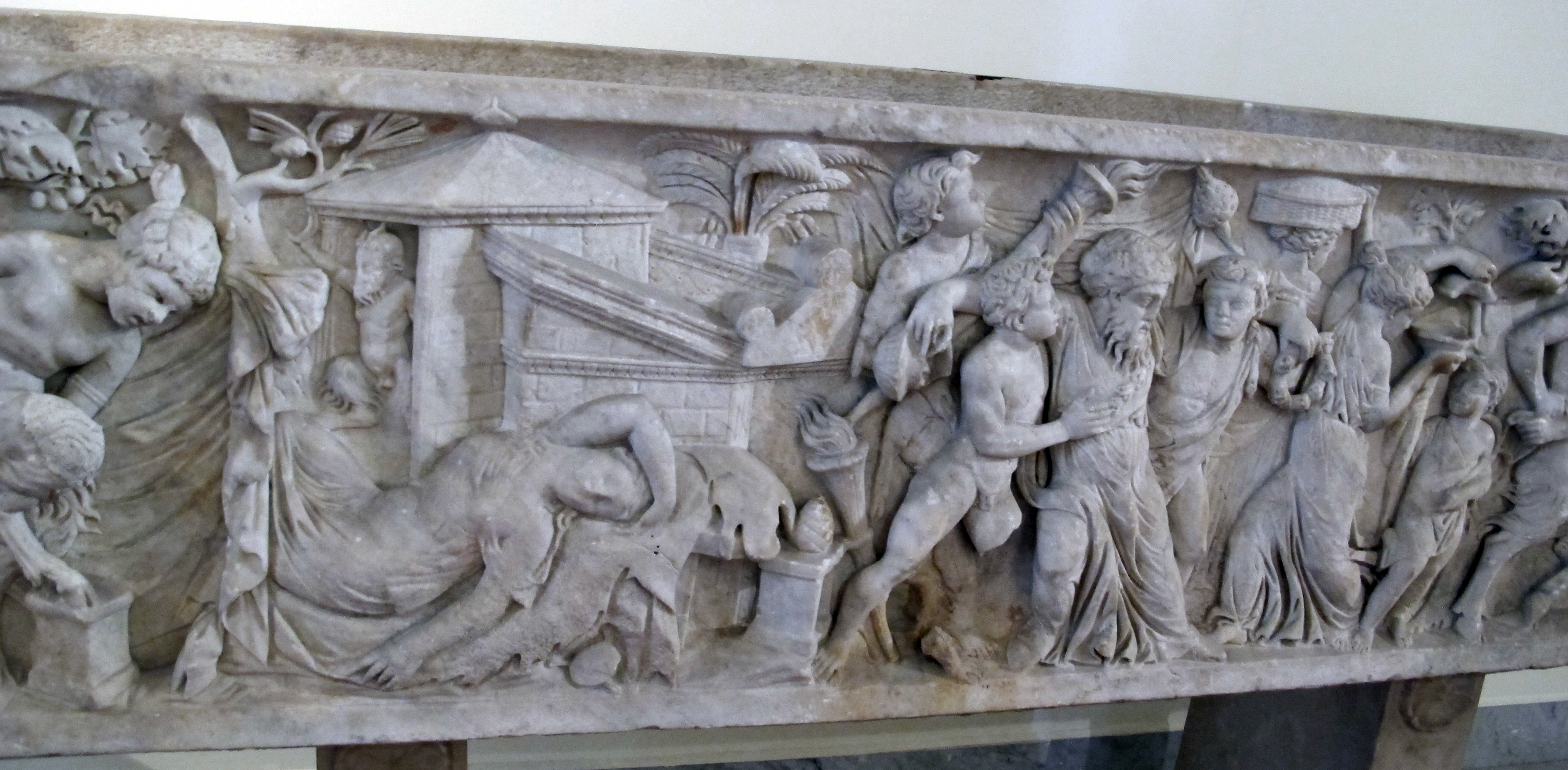 Ancient Roman sarcophagi in the Museo Archeologico (Naples)